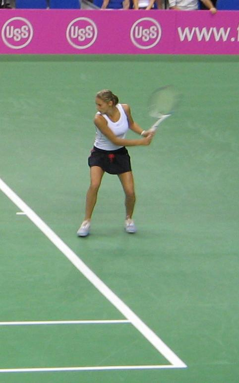 Vojislava Lukić, Serbian tennis player